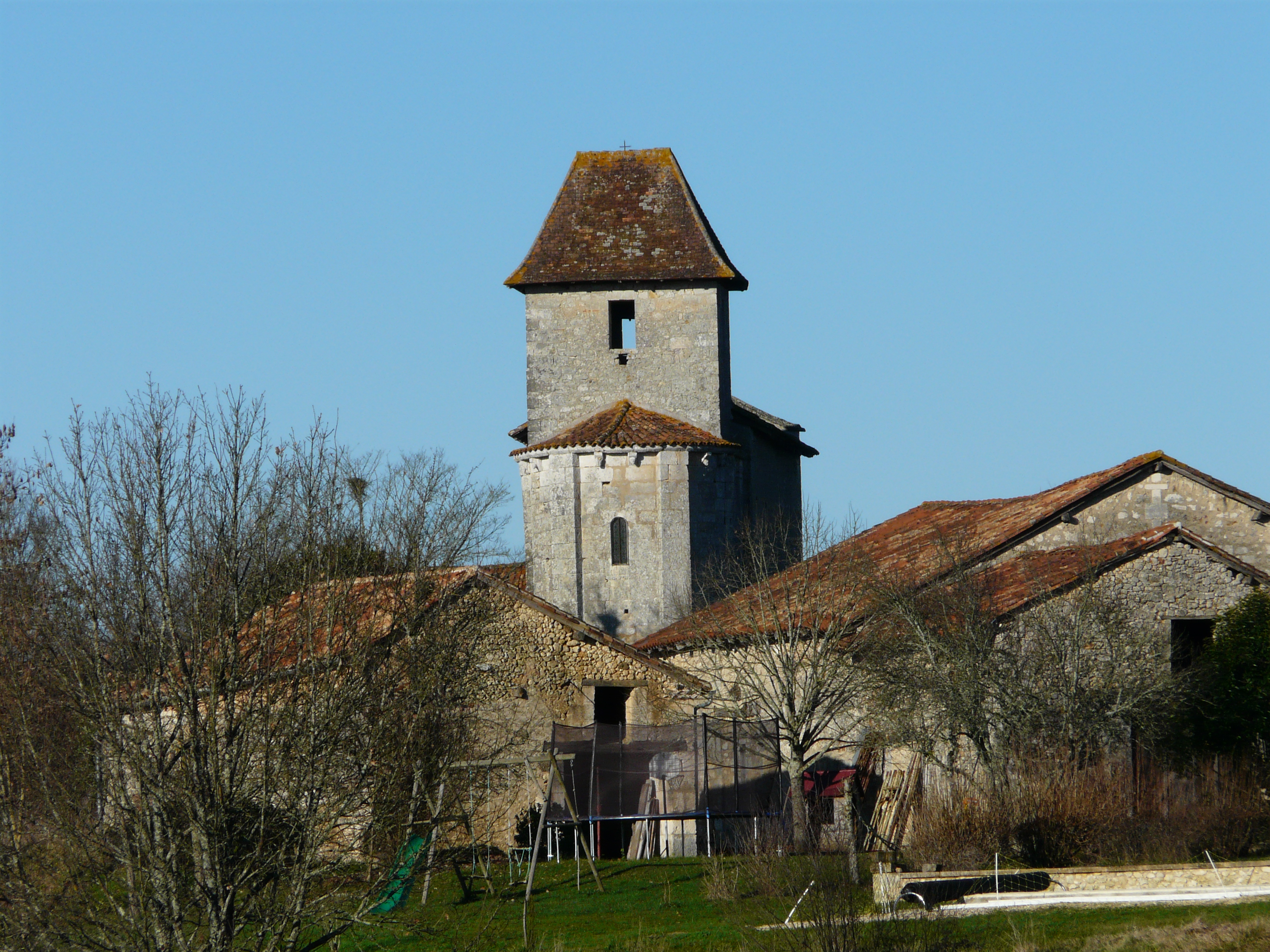 L'église de Jumilhac-le-Petit, La Chapelle-Faucher, Dordogne, France Object location45° 23′ 02.7″ N, 0° 45′ 49.8″ E .